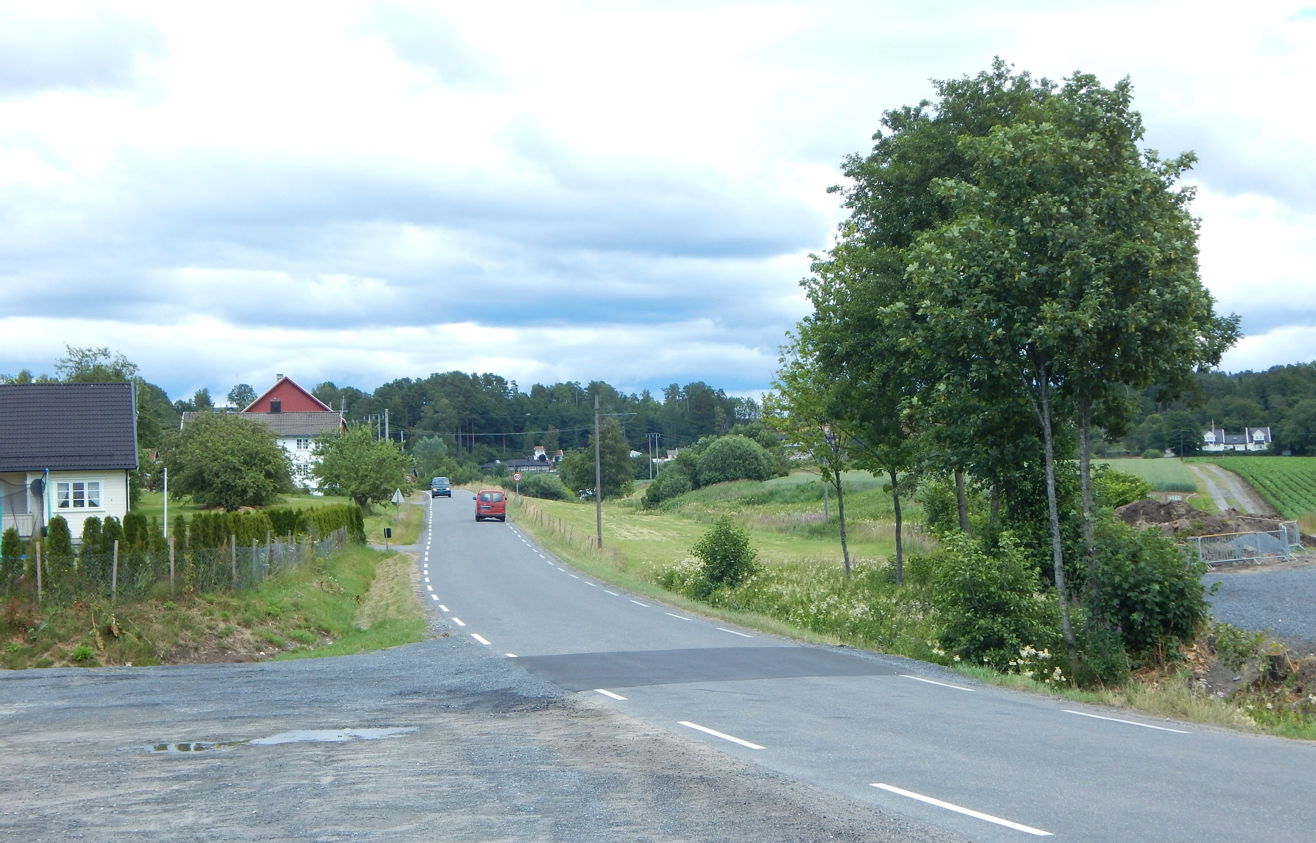 Fylkesvei 32 like foran Landvik kirke